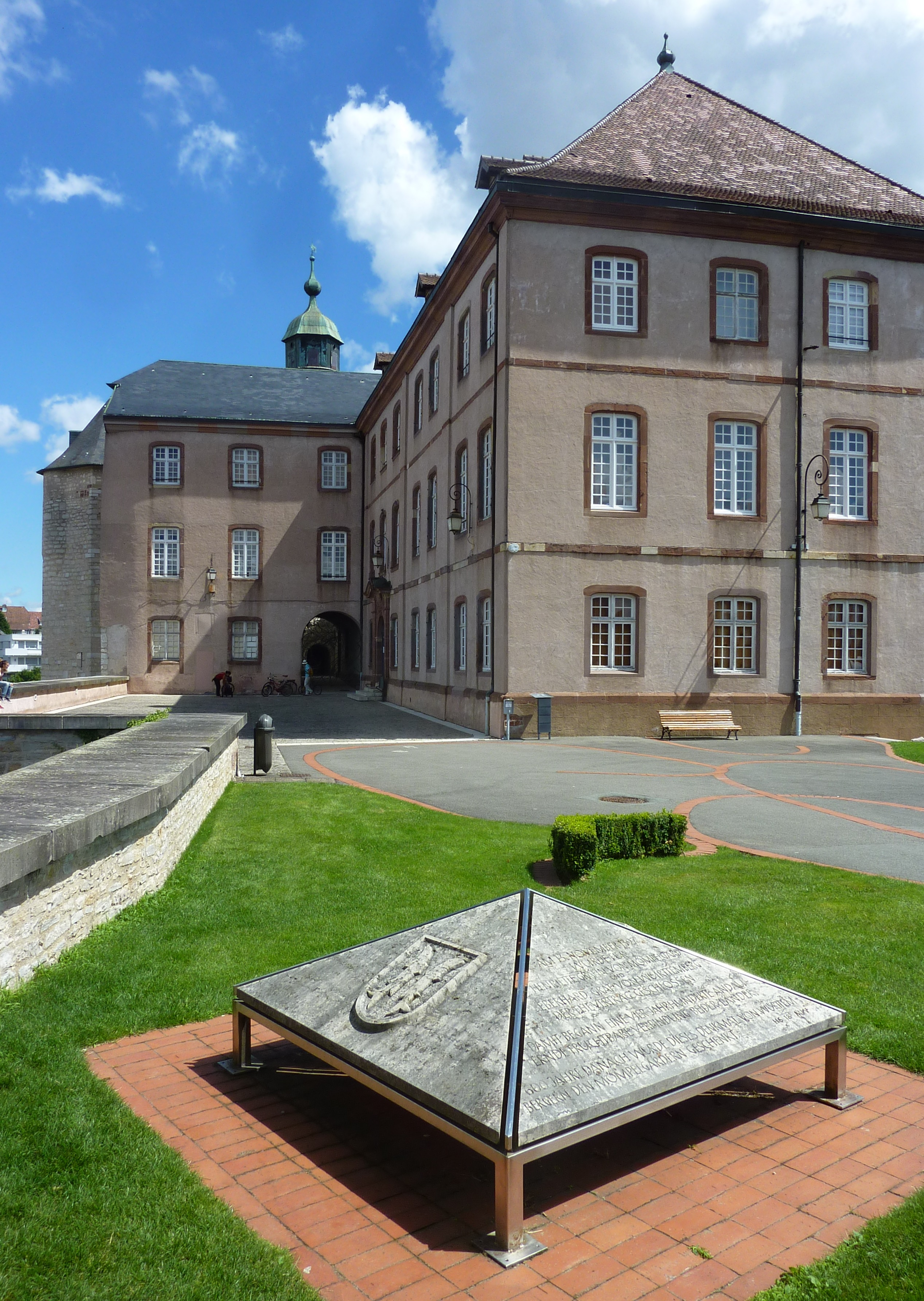 Pyramide von Mömpelgard auf der Schlossterasse in Montbéliard von Markus Wolf (1997).